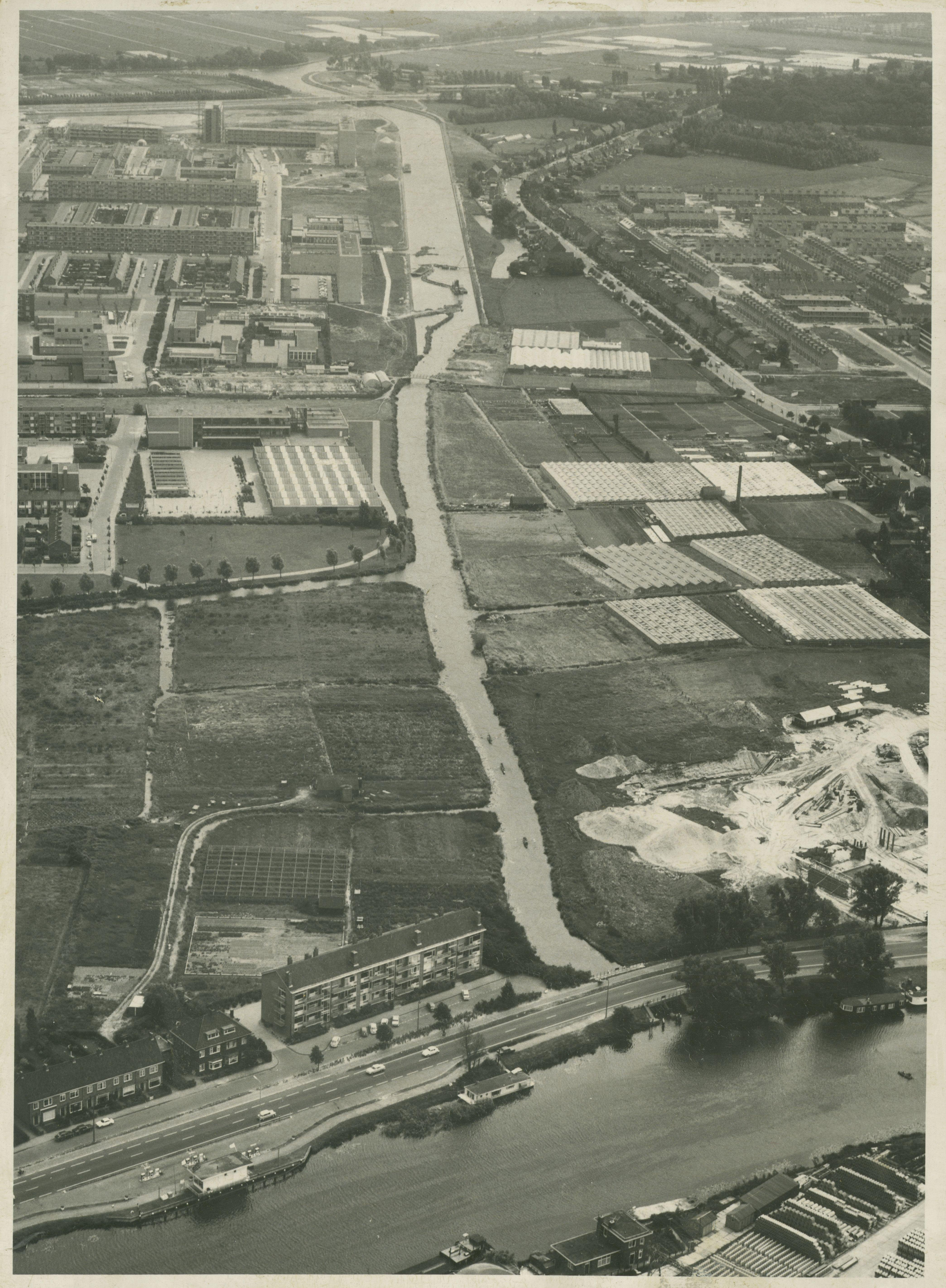 Luchtfoto van de Korte Vliet ten tijde van de verbreding van het kanaal. Links op de foto is nieuwbouw in Leiden Zuidwest zichtbaar, rechts ziet men de aanbouw van de Voorschotense wijk Noord-Hofland.